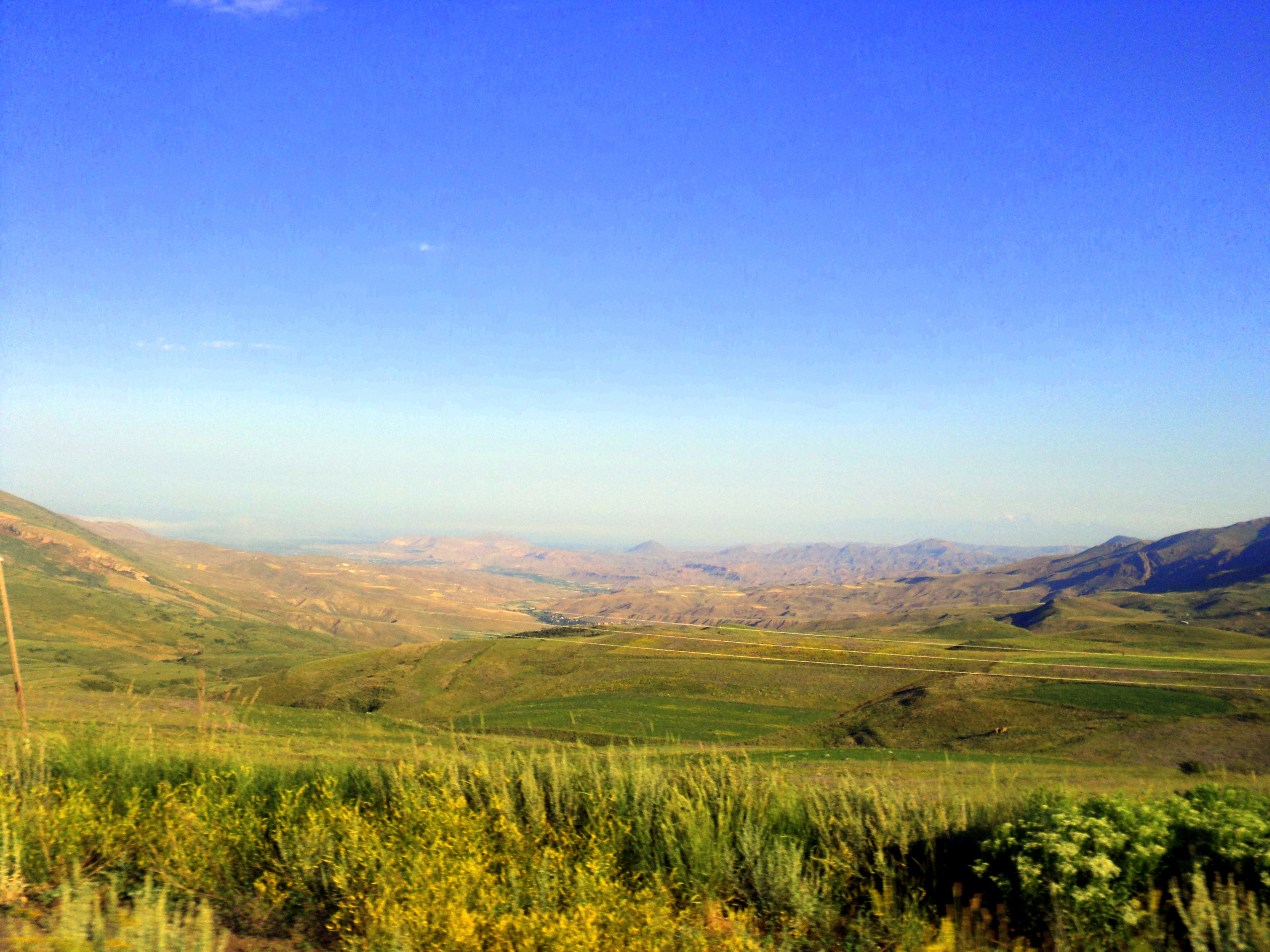 Lousashogh, St Karapet